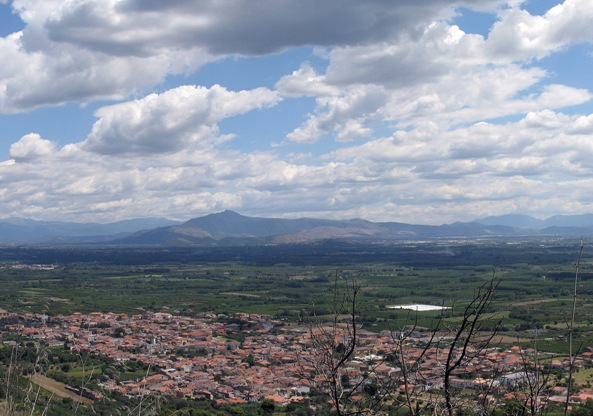 Foto di Falciano del Massico